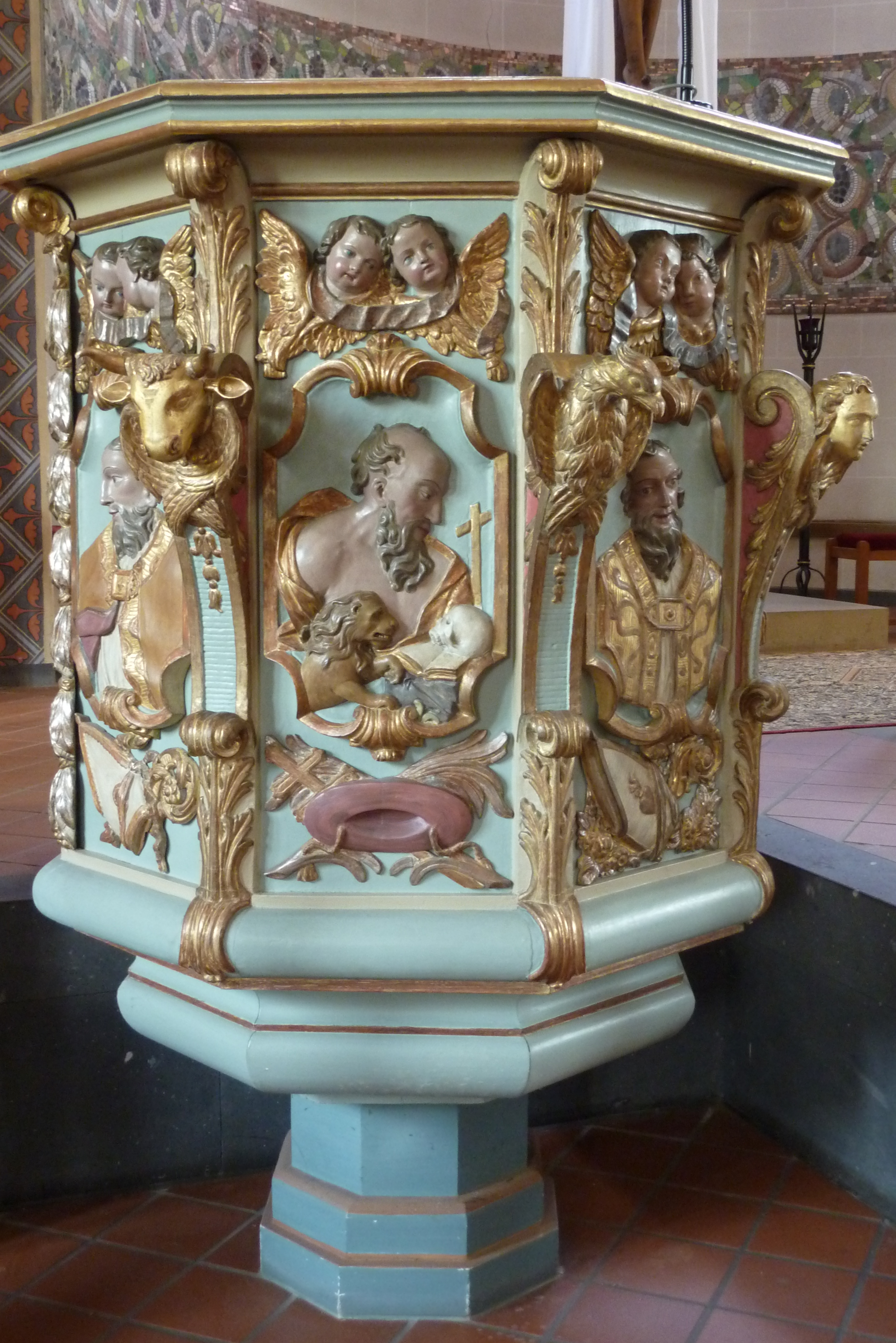 Kirche St. Nikolaus und St. Rochus in Mayschoß, Kanzel